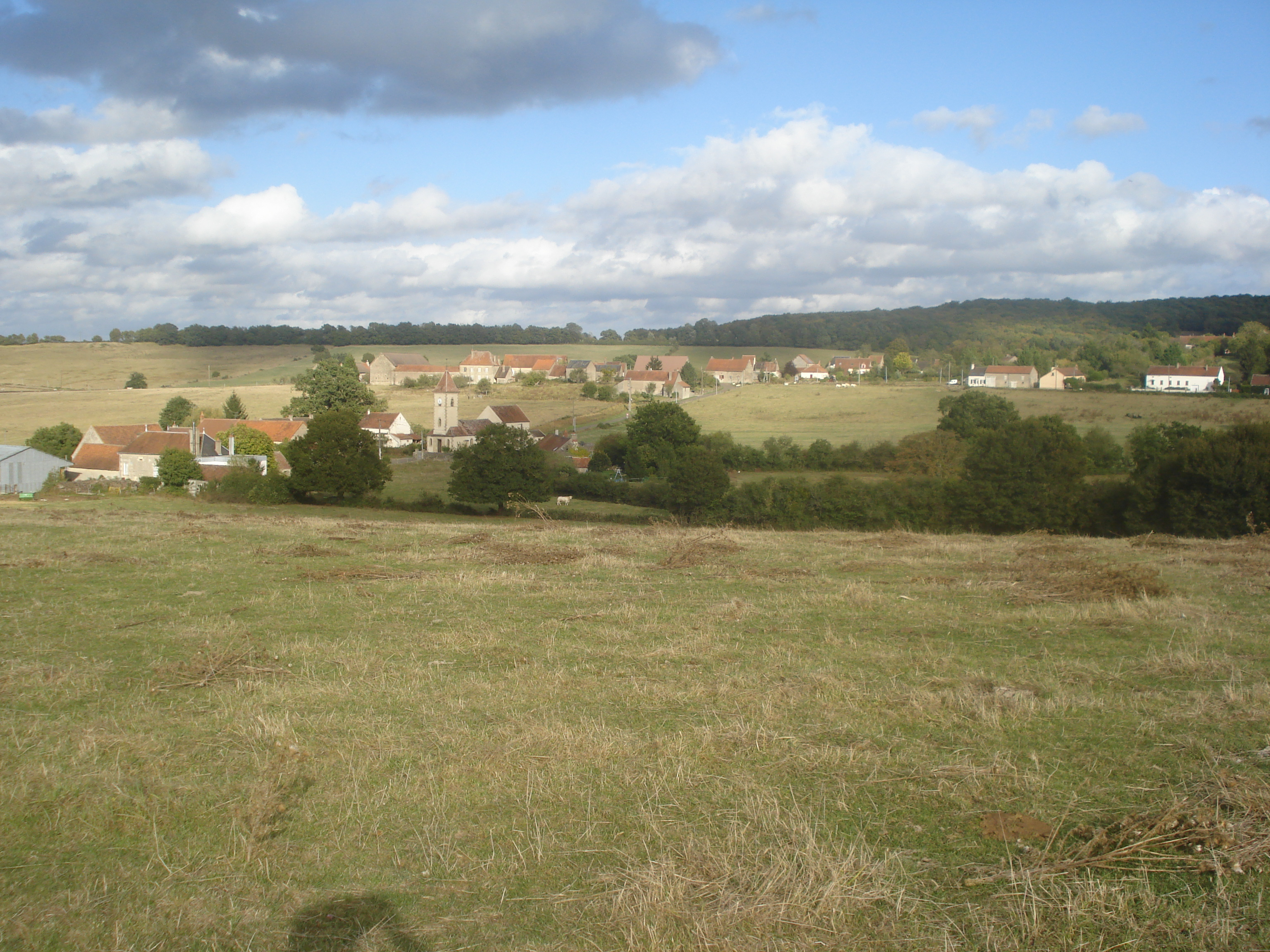 Vue d'ensemble du village de Bussy la Pesle situé dans le canton de Brinon sur Beuvron (Nièvre).